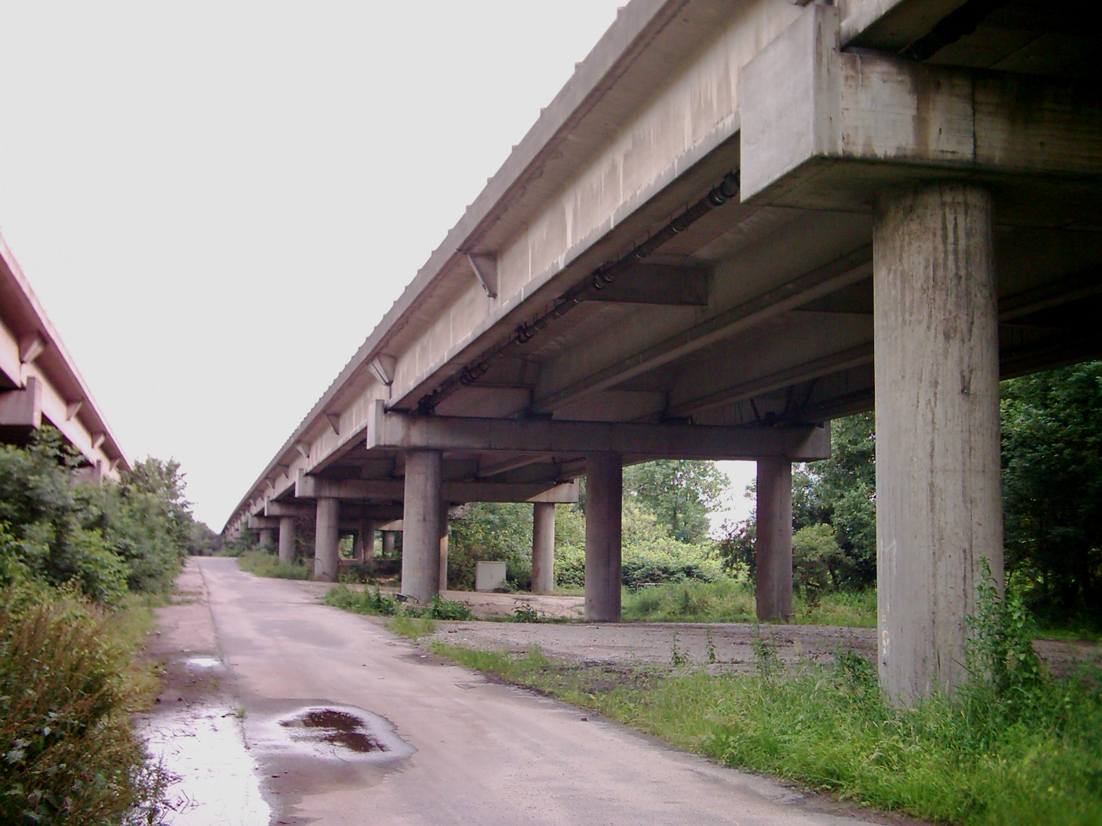 Die Hochstraße Elbmarsch im Verlauf der A 7. Aufgenommen in Höhe Altenwerder, zwischen der AS Waltershof und dem Ende der Brücke in Moorburg.